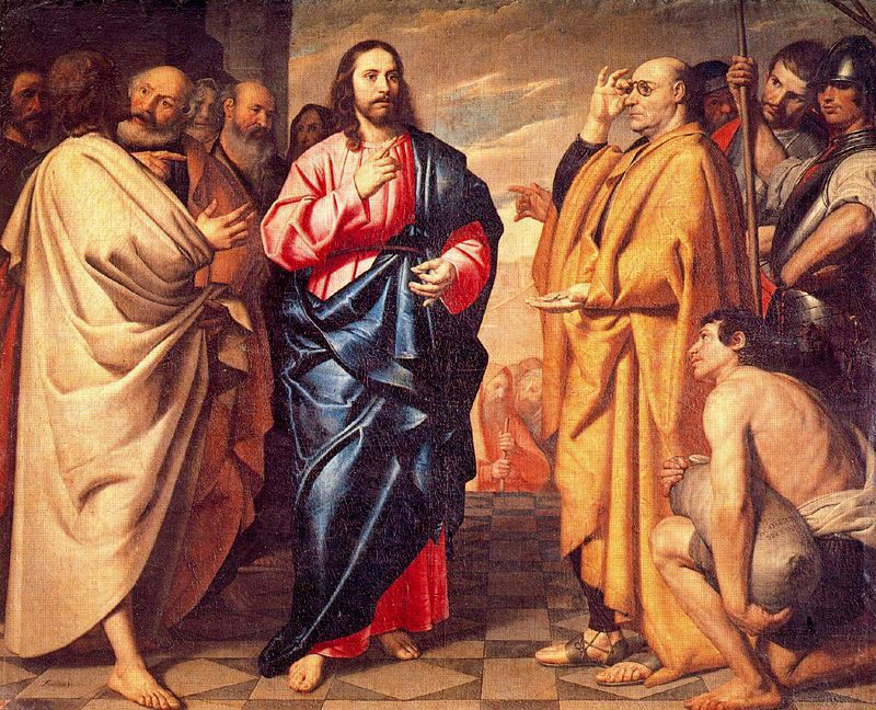 La obra representa a Jesucristo en el momento de pronunciar la sentencia: «Dad al César lo que es del César y a Dios lo que es de Dios».